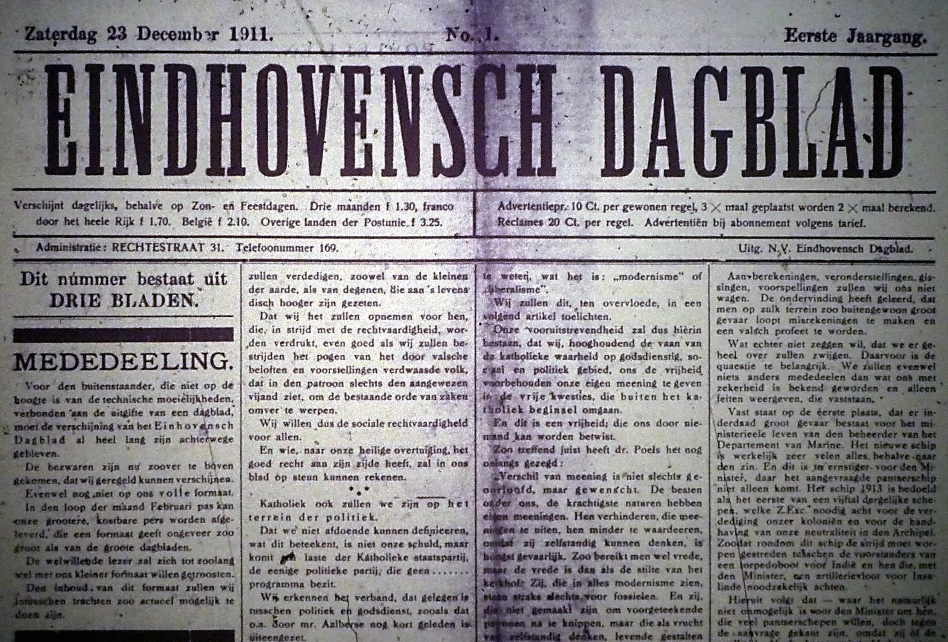 Eindhovensch dagblad Voorpagina van de nieuwe krant